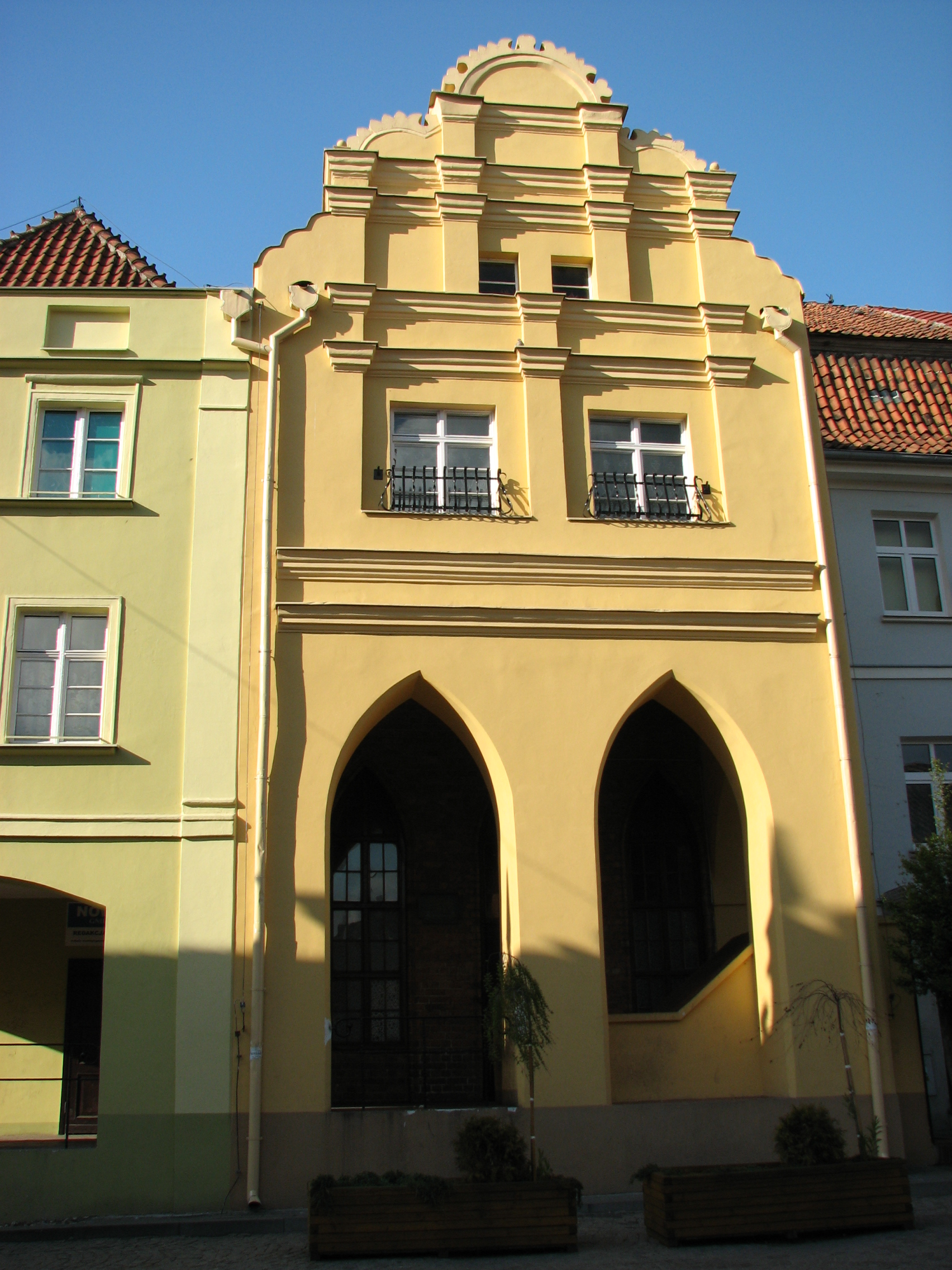 Kamienica w Gniewie